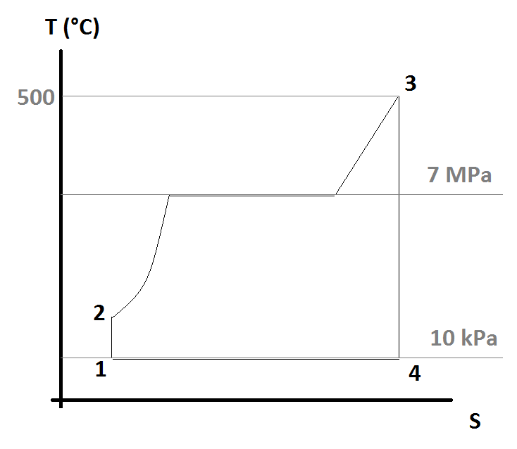 Gráfico para exemplificação do processo ideal do ciclo termodinâmico higroscópico